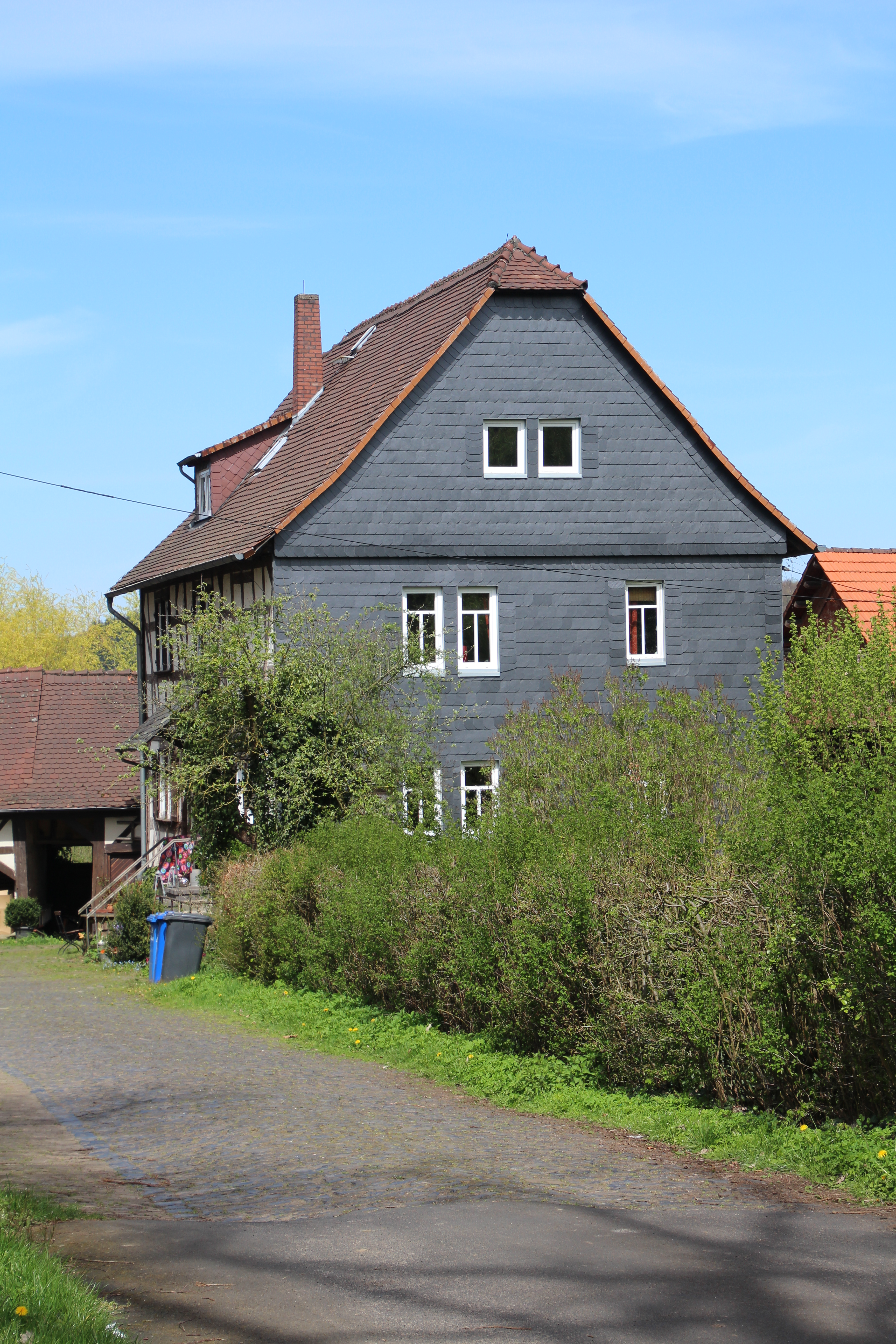 Ehemaliges Pfarrhaus Kirchberg (Lahn)